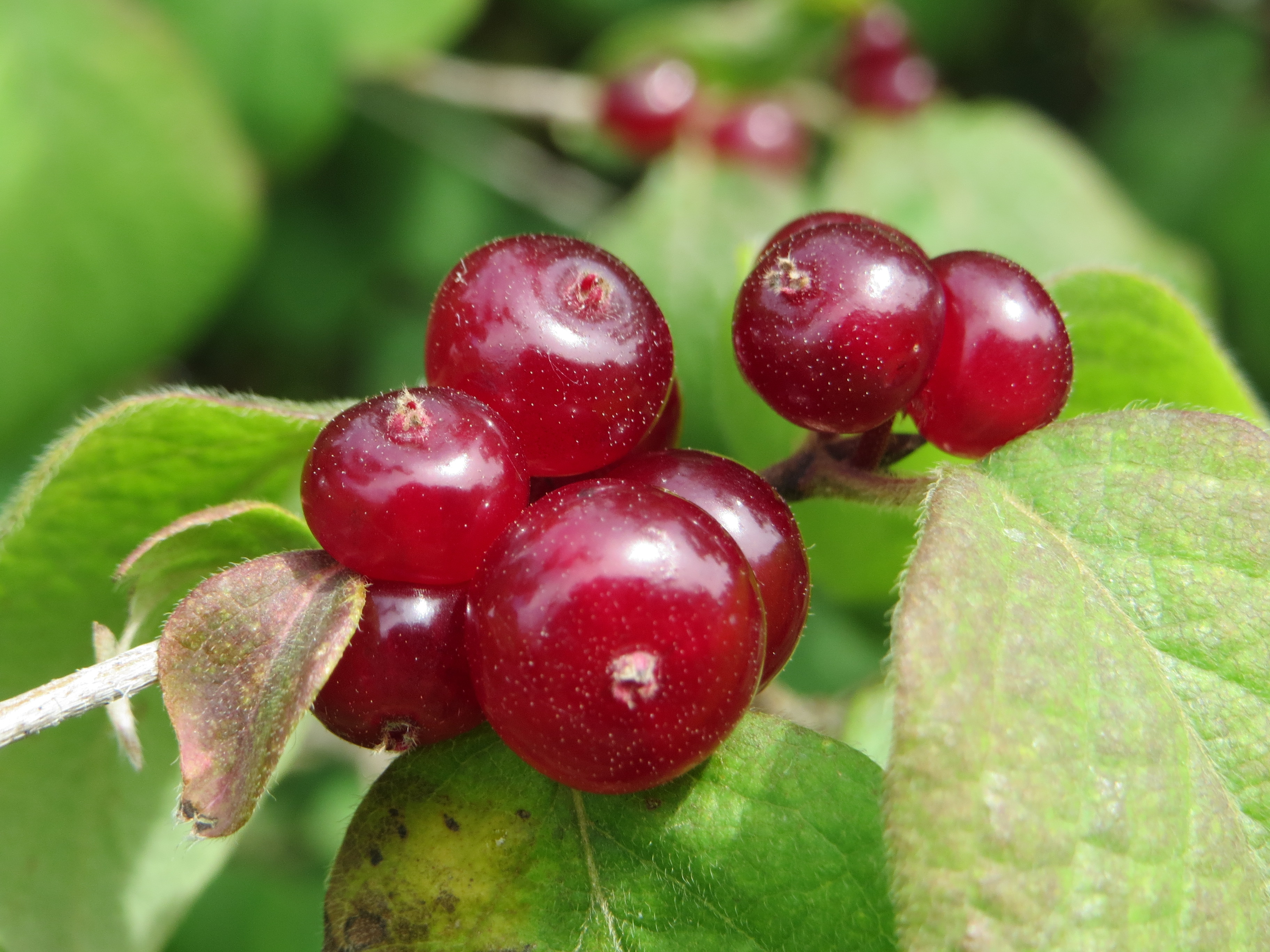 Rote Heckenkirsche (Lonicera xylosteum) im Landschaftsschutzgebiet Hockenheimer Rheinbogen